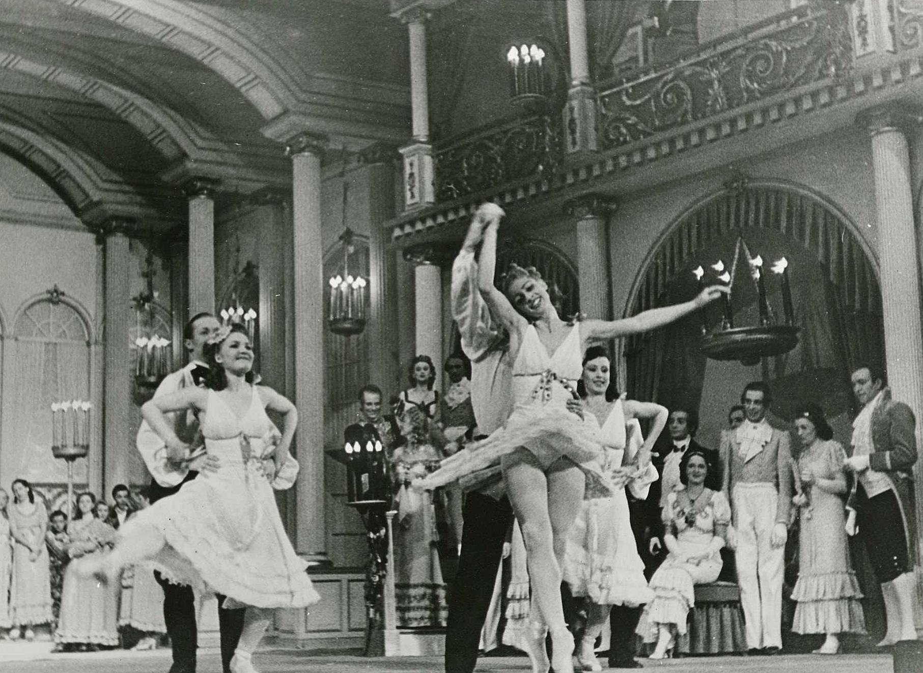 Beskrivelse: Fra en tysk forestilling i det rekvirerte Nationaltheatret. Et ensemble fra ”Theater am Nollendorfplatz” i Berlin, fremfører Strauss- operetten ”Wiener blut”. Flere kjente tyske skuespillere og teaterledere gjestet Norge etter invitasjon fra Nazi-myndighetene. Arkivreferanse: Bildarchiv Reichskommissariat, eske 28 mappe ”Theater und variete” Url